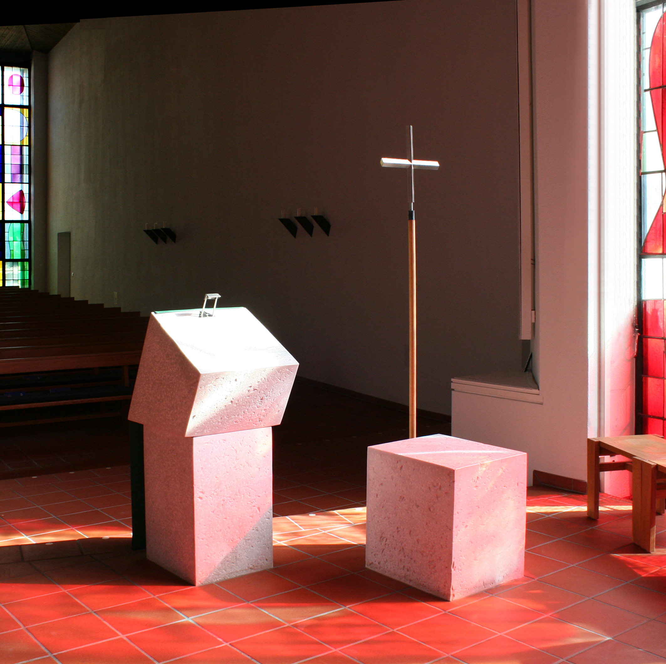 Römisch-katholische Pfarrkirche St. Antonius Wallisellen, Ambo